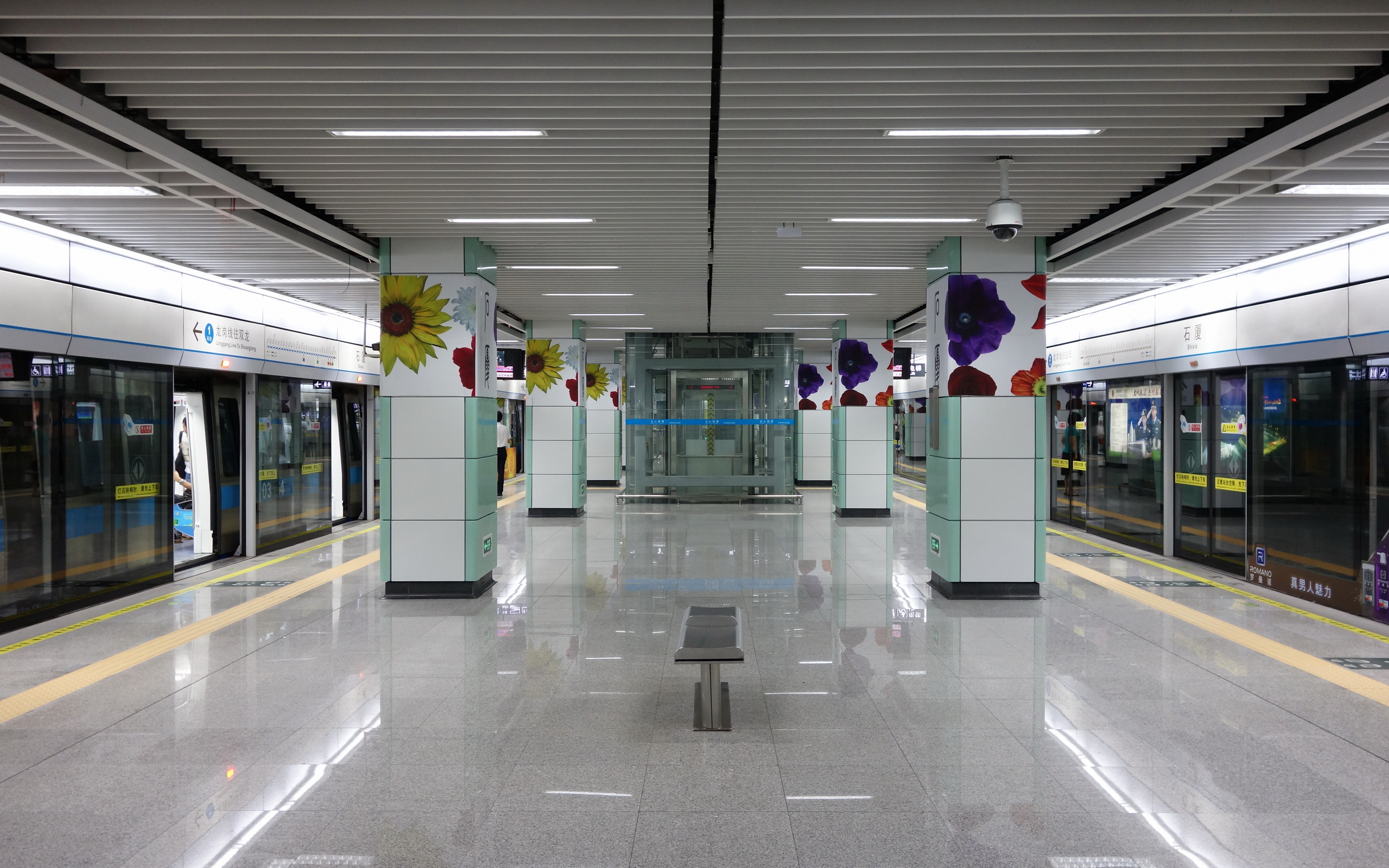 龙岗线石厦车站站台